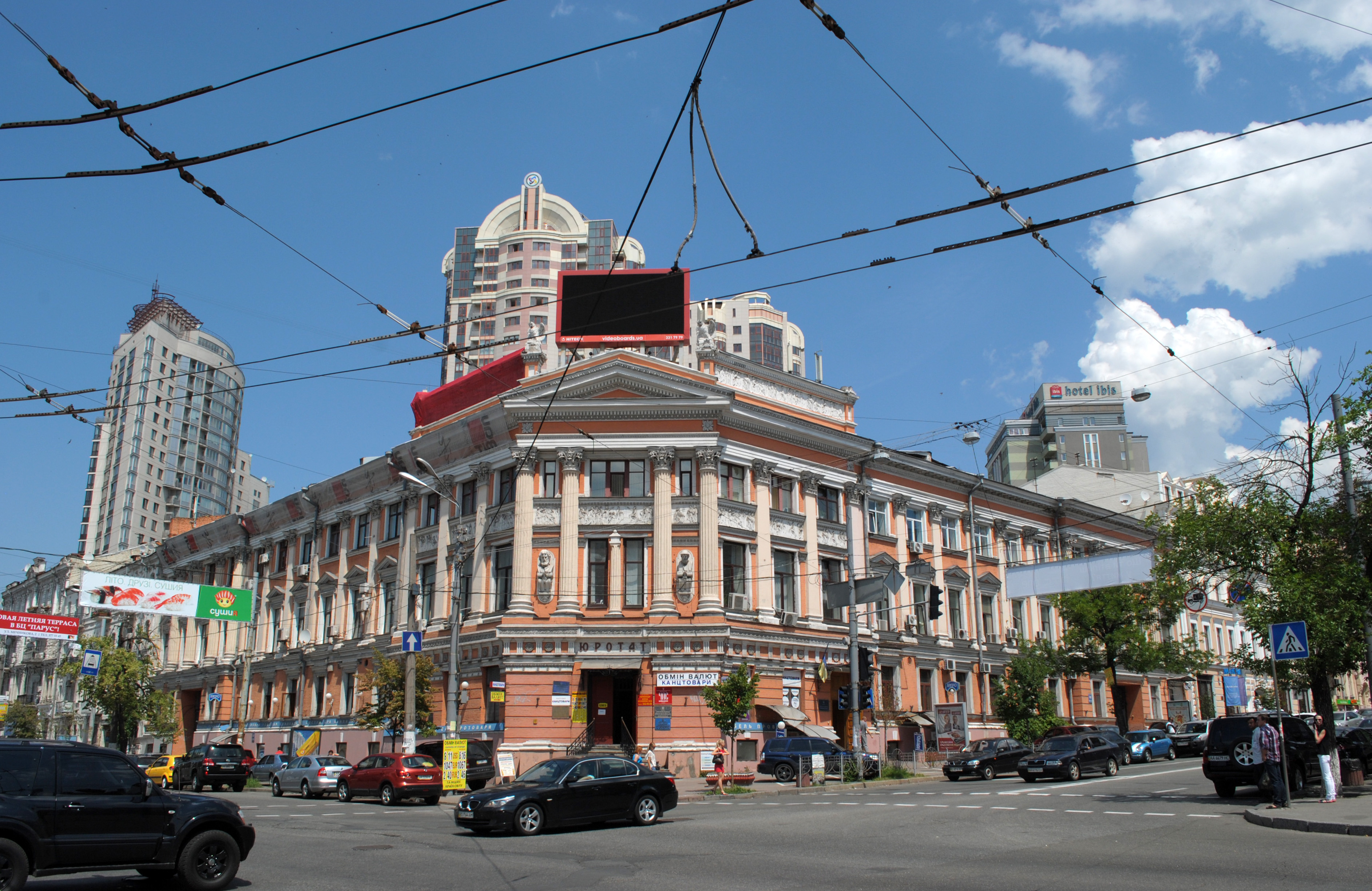 Будинок Південно-російського товариства торгівлі аптекарськими товарами («ЮРОТАТ»), Київ, Петлюри Симона вул., 16/108